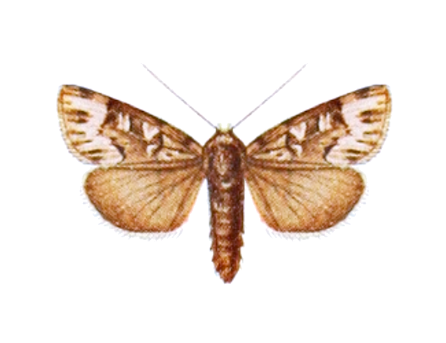 [Agrotiphila] staudingeri (Möschl.) = Xestia staudingeri (Möschler, 1862), ♂, Colorado.